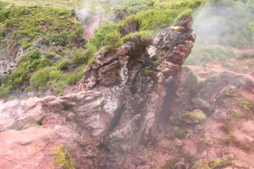 Furnas do Enxofre, ilha Terceira, Açores, Portugal.